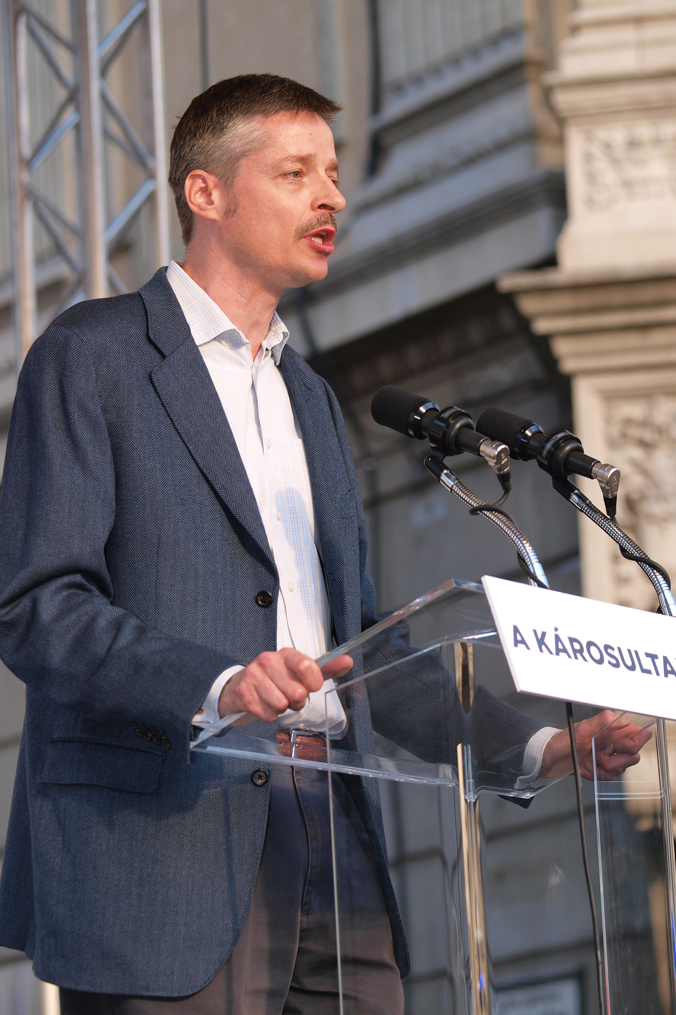 Kerék-Bárczy Szabolcs DK-s politikus a Quaestor-tüntetésen 2015. ápr. 11-én